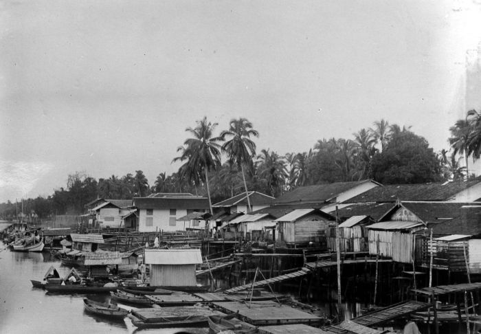 Repronegatief. Riviergezicht in Moearatewe